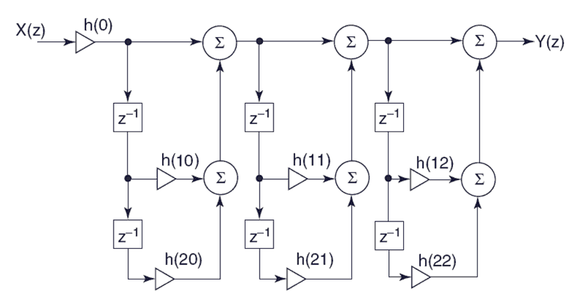 FIR Filterstruktur, Kaskadenform